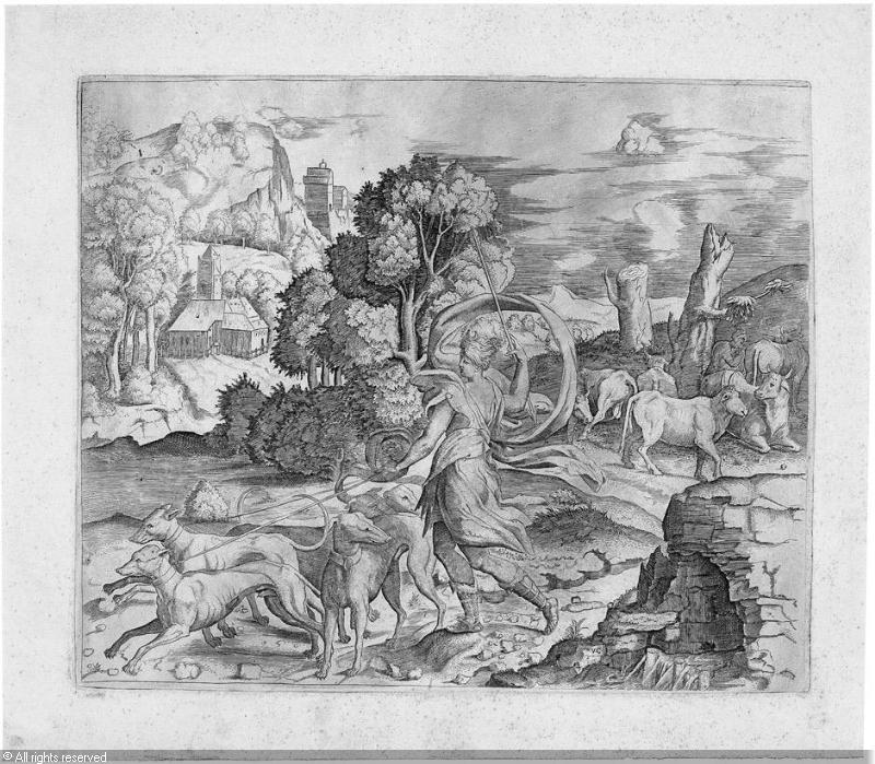 Diana als Jägerin